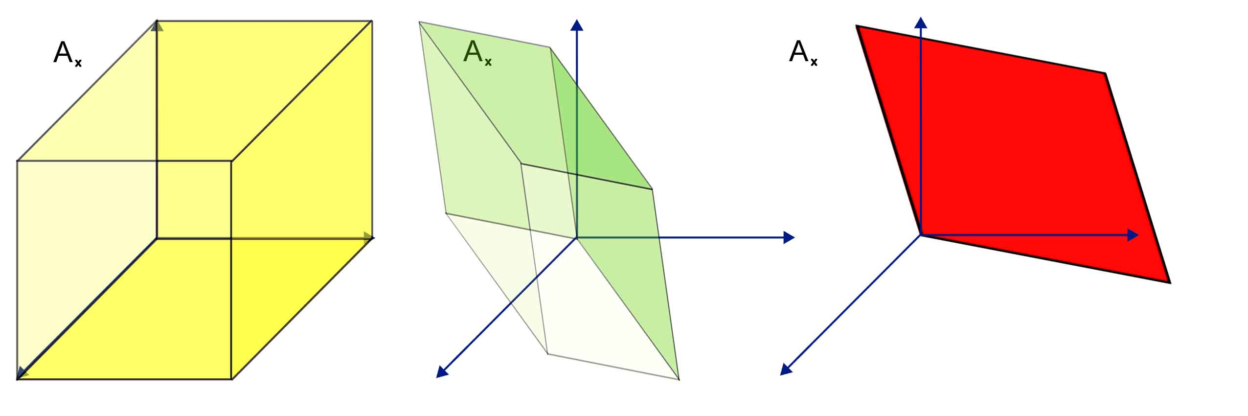 Image du cube unité (en jaune) par deux applications linéaires en dimension 3. L'une à un déterminant nul (en rouge) l'autre non (en vert).